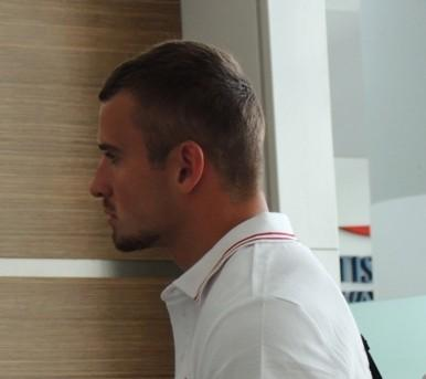 Grzegorz Zimniewicz, polski sprinter, wicemistrz Europy do lat 23 w sztafecie 4 x 100 metrów